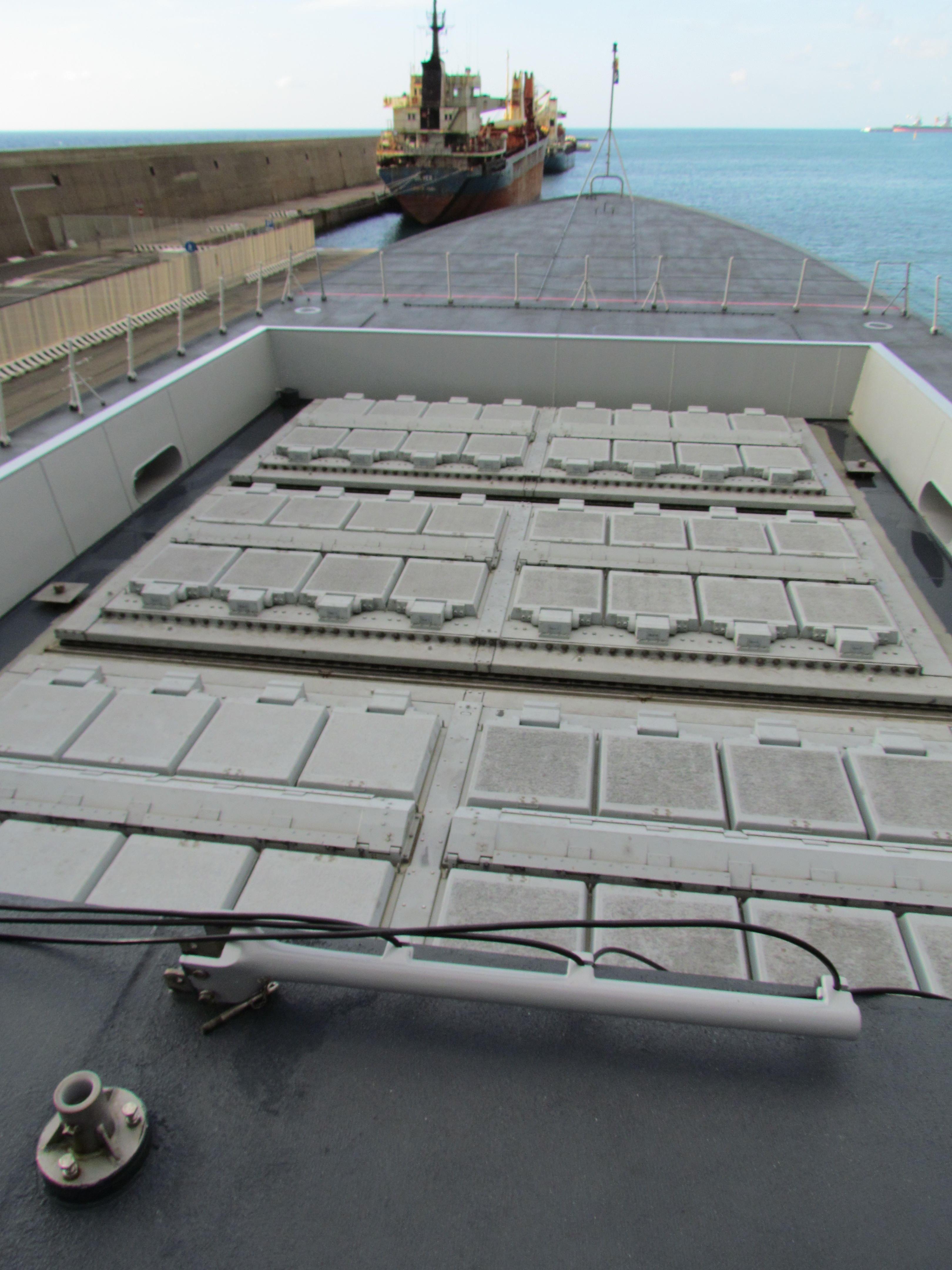 VLS Sylver del cacciatorpediniere italiano Caio Duilio